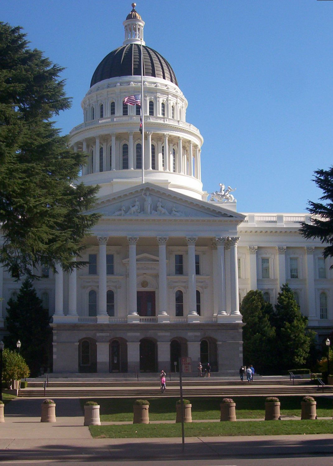 Capitol in Sacramento, Regierungssitz des Gouverneurs